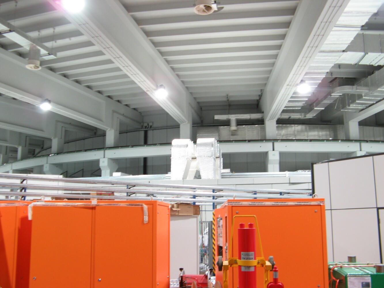 Interno del Sincrotrone "Elettra", a Basovizza, Trieste